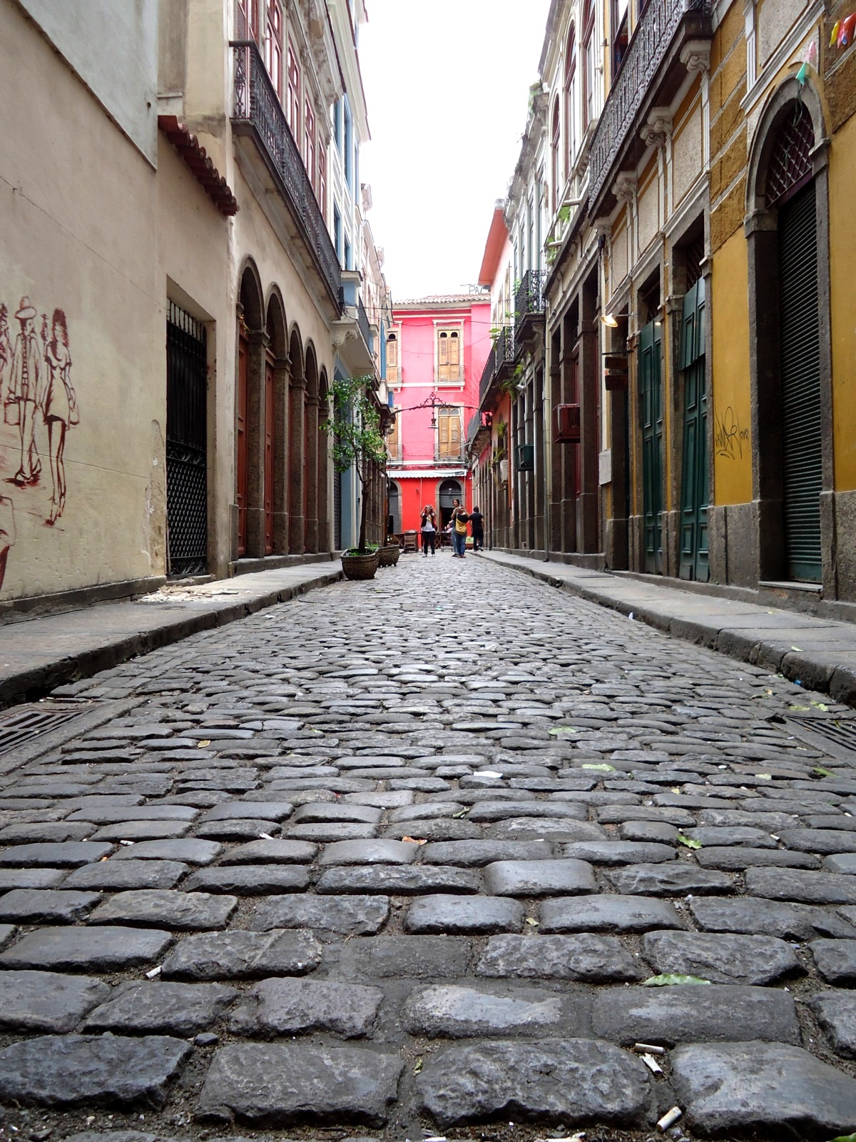 Travessa do Comércio, próxima à Praça XV.